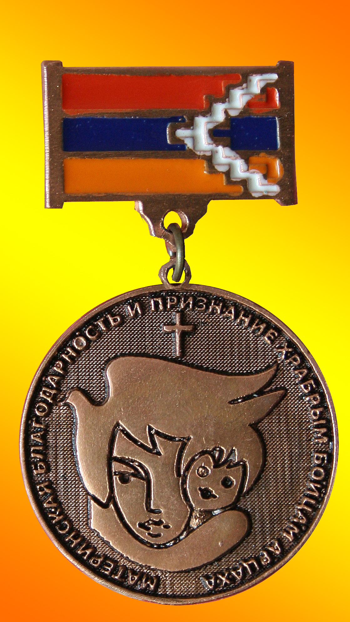 «Մայրություն» հիմնադրամ